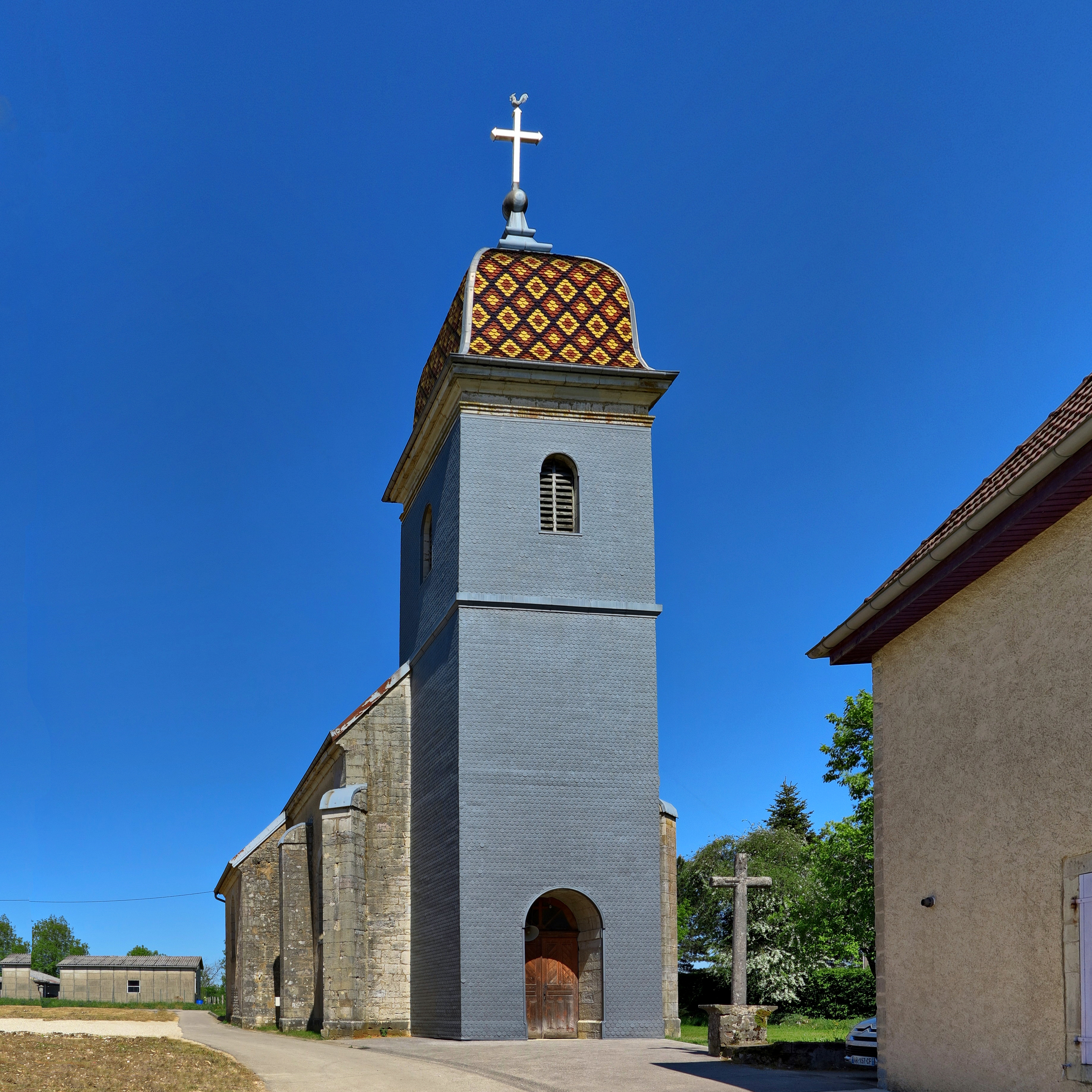 L'église